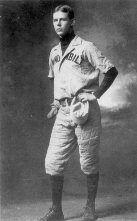 Grantland Rice in Vanderbilt uniform